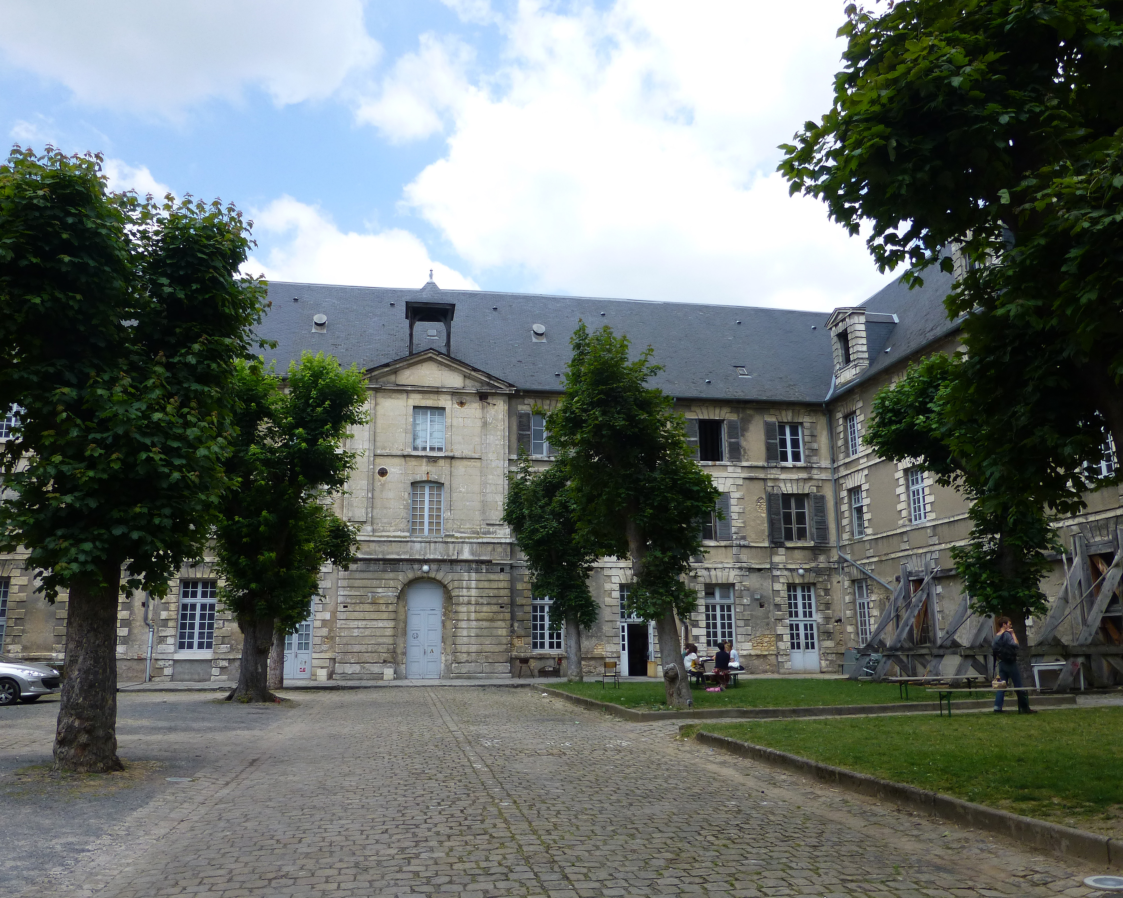 Bourges (Cher) : ancien Collège des Jésuites, aujourd'hui Ecole nationale supérieure d'art